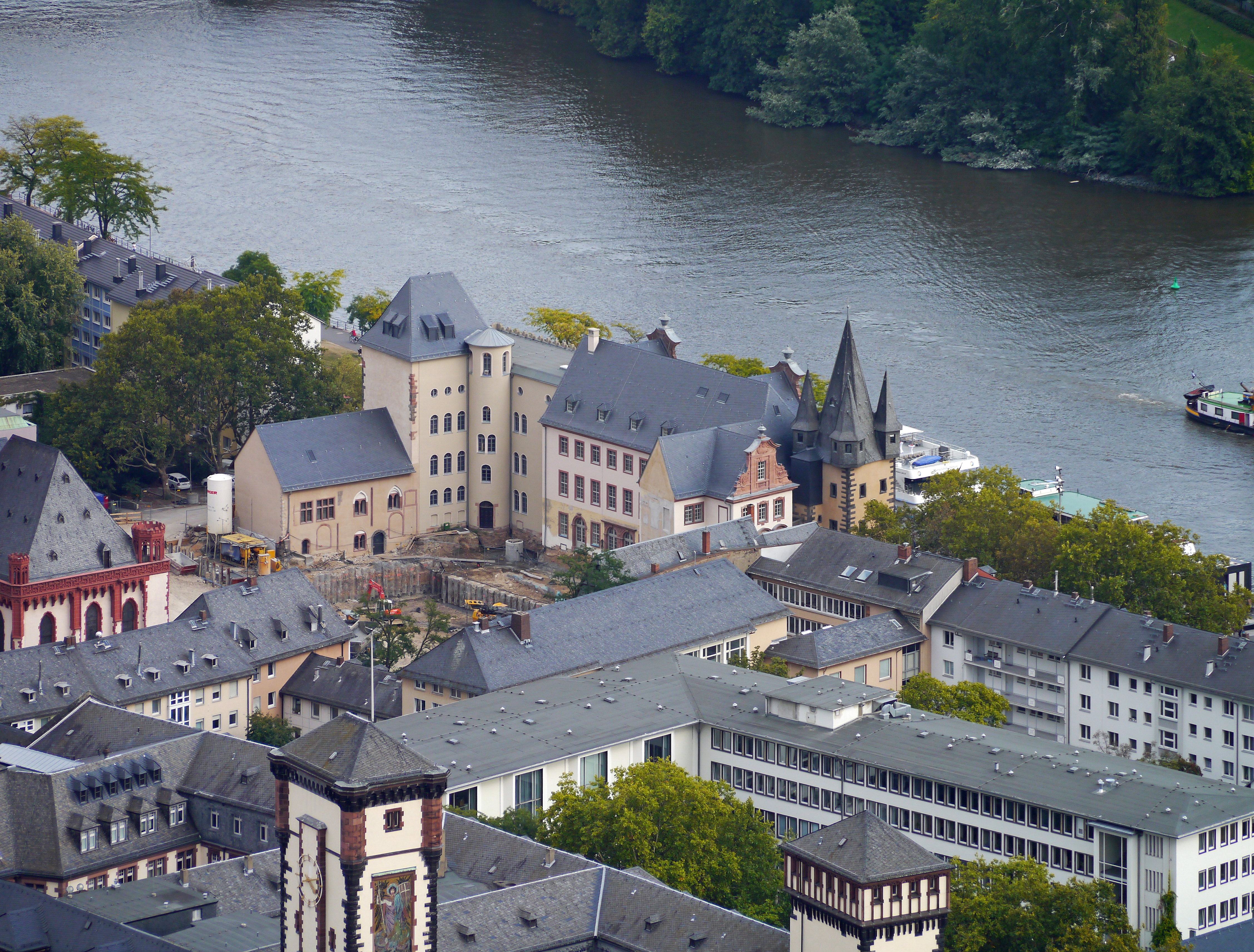 Bauplatz des Historischen Museums. 2012, in Frankfurt am Main.